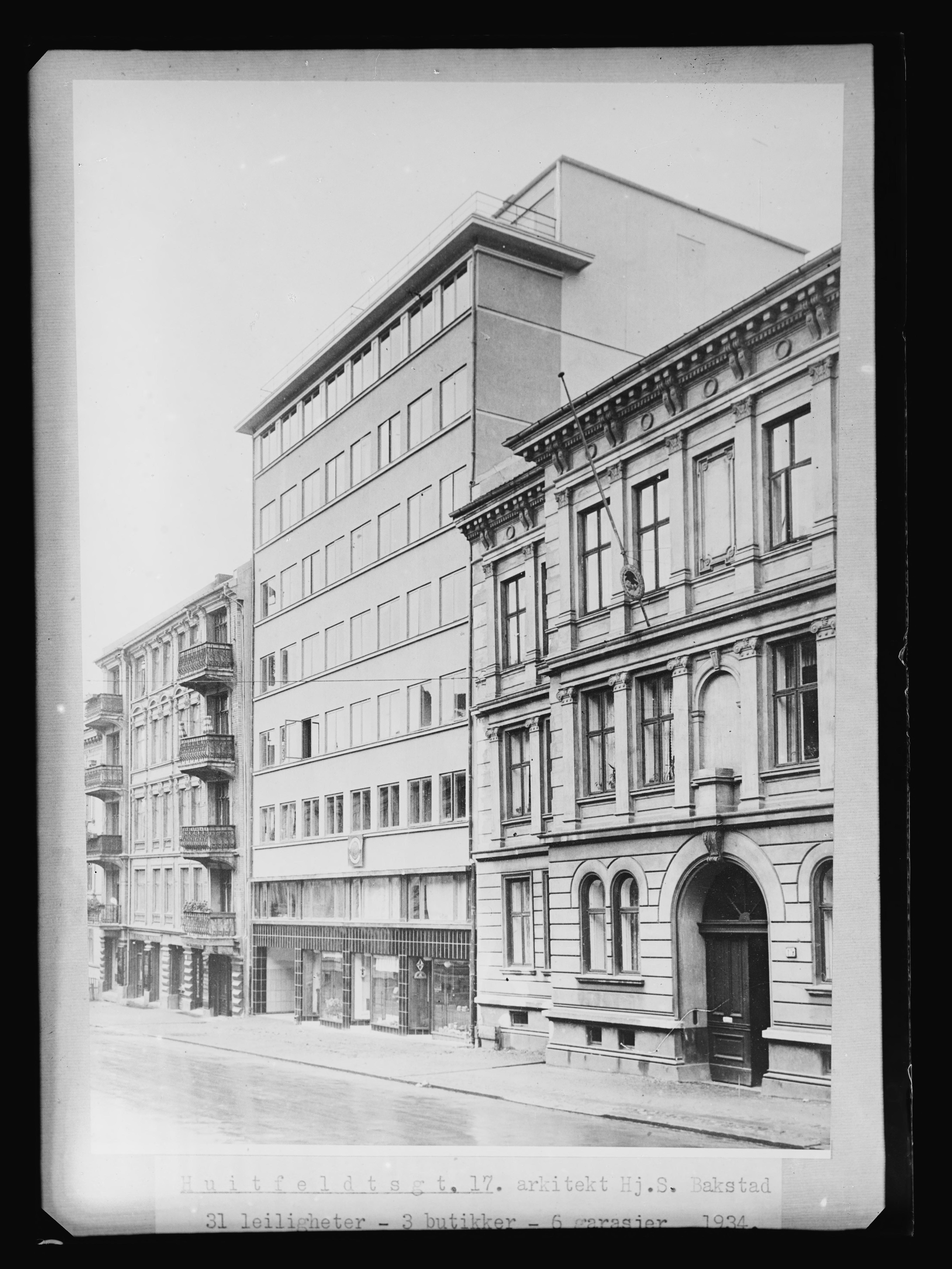 Bildet er hentet fra Nasjonalbibliotekets bildesamling. Fra Huitfeldts gate, Oslo. På høyre side ses nr. 15 (t.h.), 17 og 19. Nr. 15 ble iflg. 2. utg. av Oslo byleksikon oppført i slutten av 1870-årene, og den er revet. Nr. 17 skal være tegnet av Hj.S. Bakstad og oppført 1933–34. Nr. 19 sies i samme utgave av byleksikonet å være en bygning tegnet av Eduard Carlén og oppført i 1899. Også denne er revet i dag, og den er erstattet med en høyere bygning med helt annen fasade der balkongenes plassering minner om den på Carléns bygning.